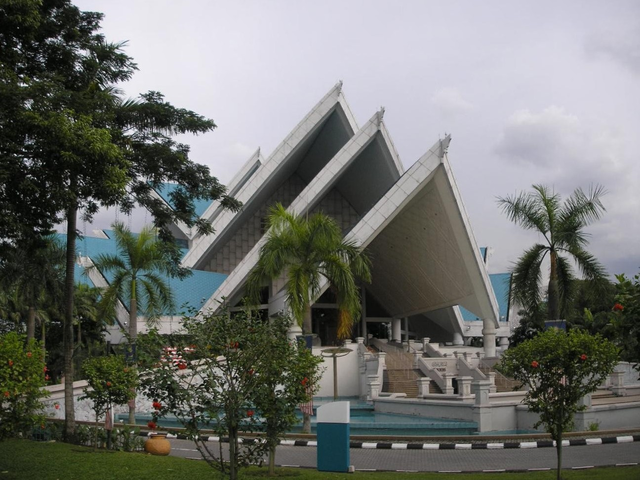 The Istana Budaya in Kuala Lumpur.